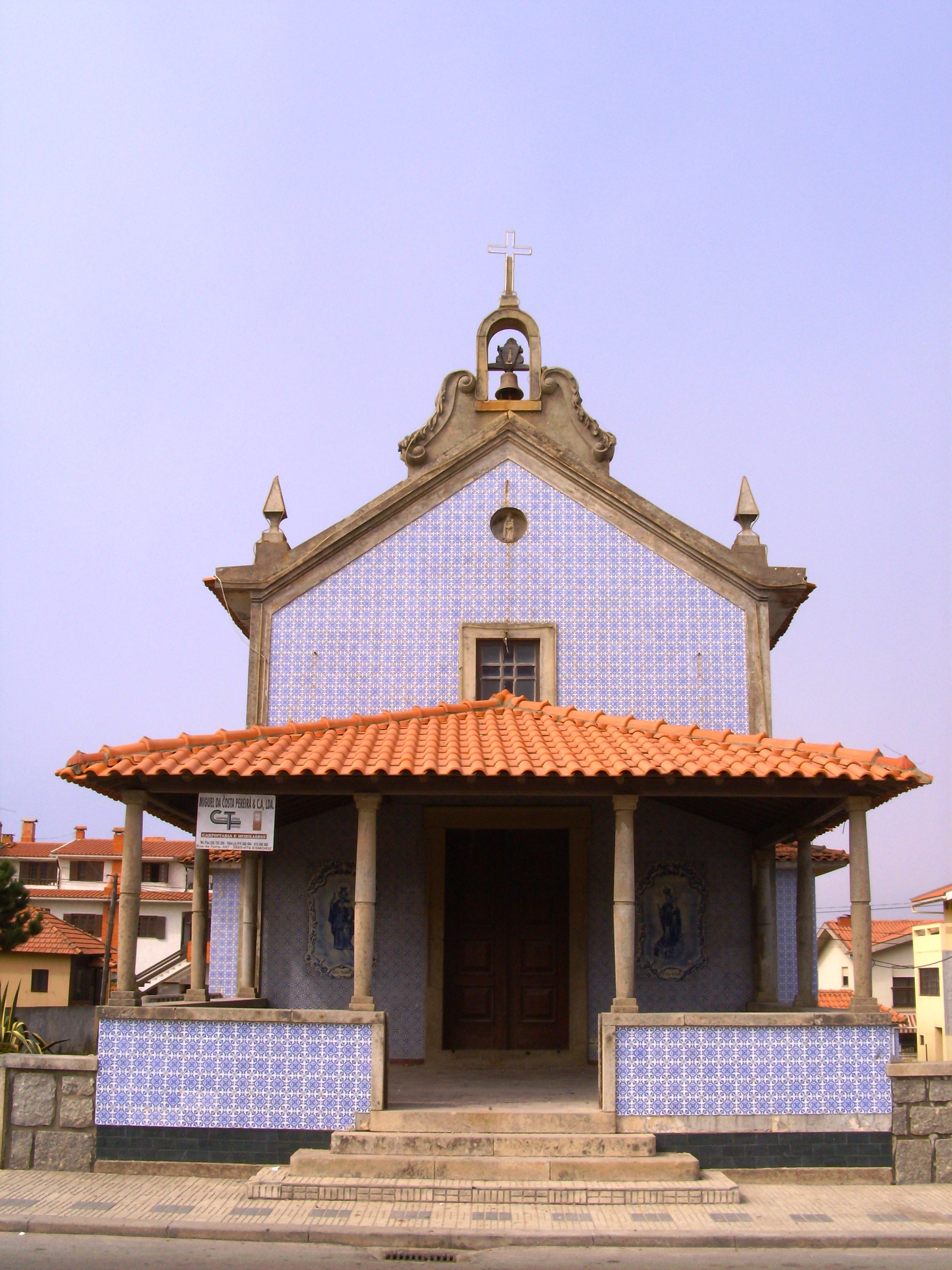 Capela de Nossa Senhora de Nazaré, praia de Cortegaça, concelho de Ovar, distrito de Aveiro, Portugal: fachada.